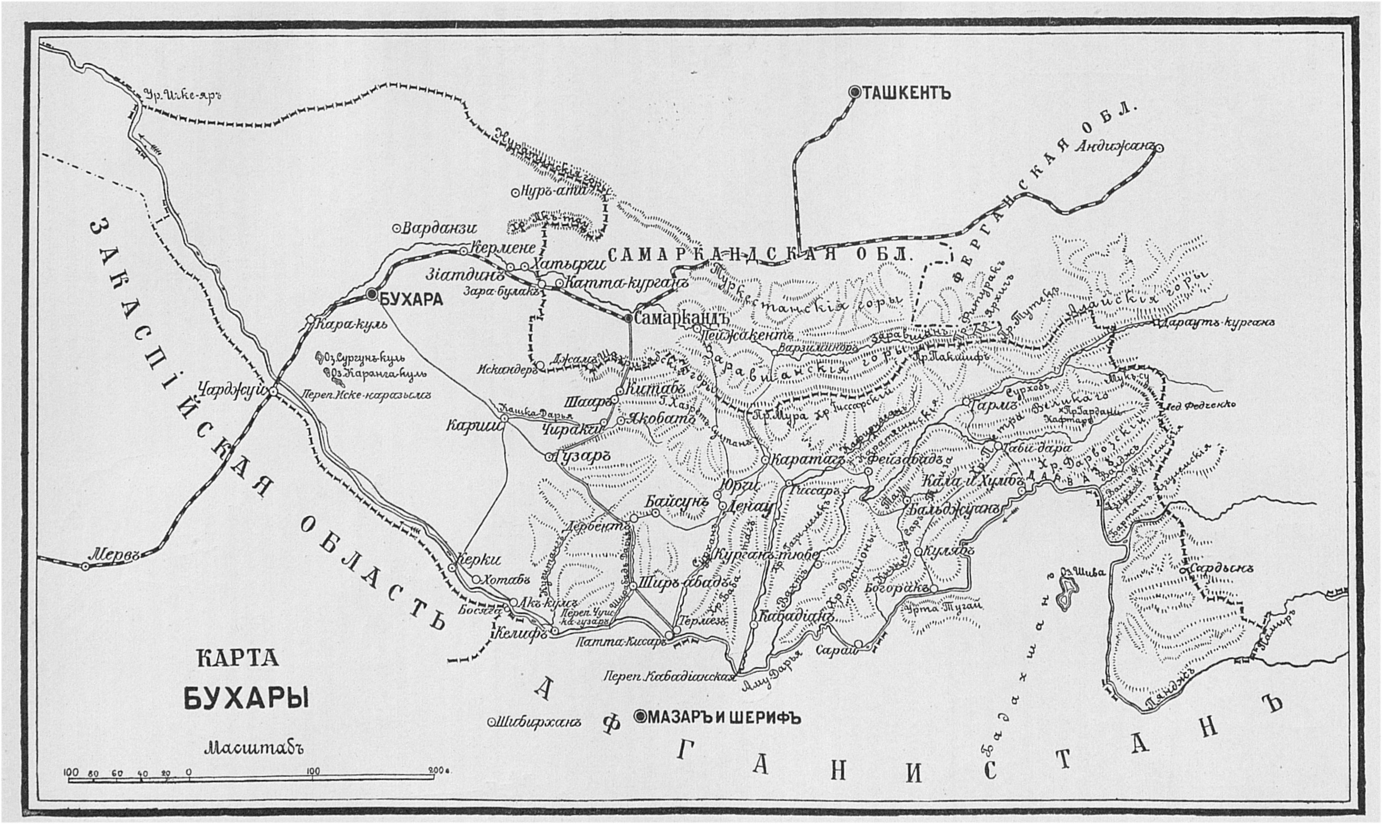 Данное изображение было использовано в статье «Бухара» опубликованной в пятом томе «Военной энциклопедии», который был издан книгоиздательским товариществом Ивана Дмитриевича Сытина в 1911 году в столице Российской империи городе Санкт-Петербурге.